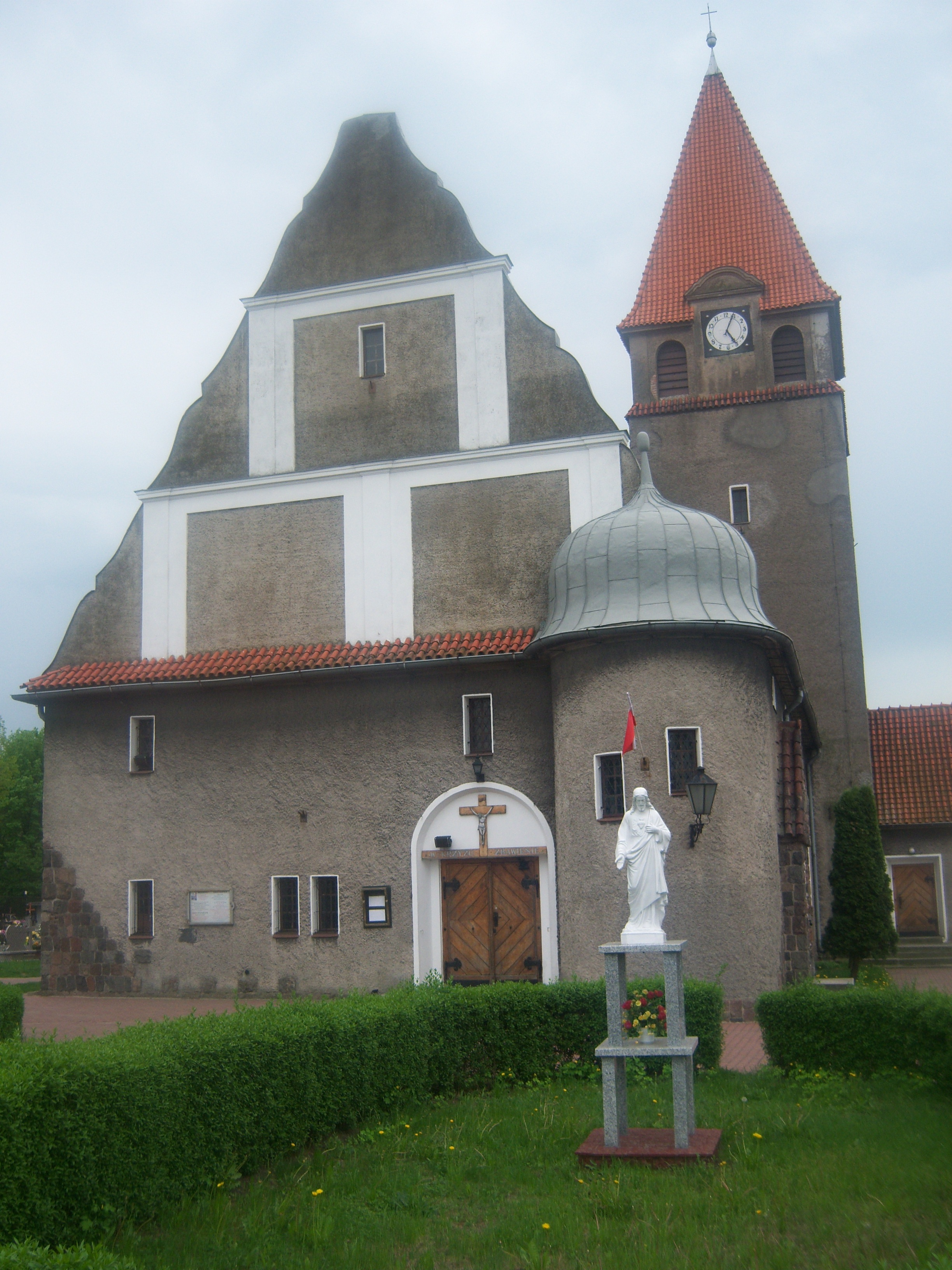 Węgierki - kościół parafialny pw. Serca Pana Jezusa (widok od szosy)